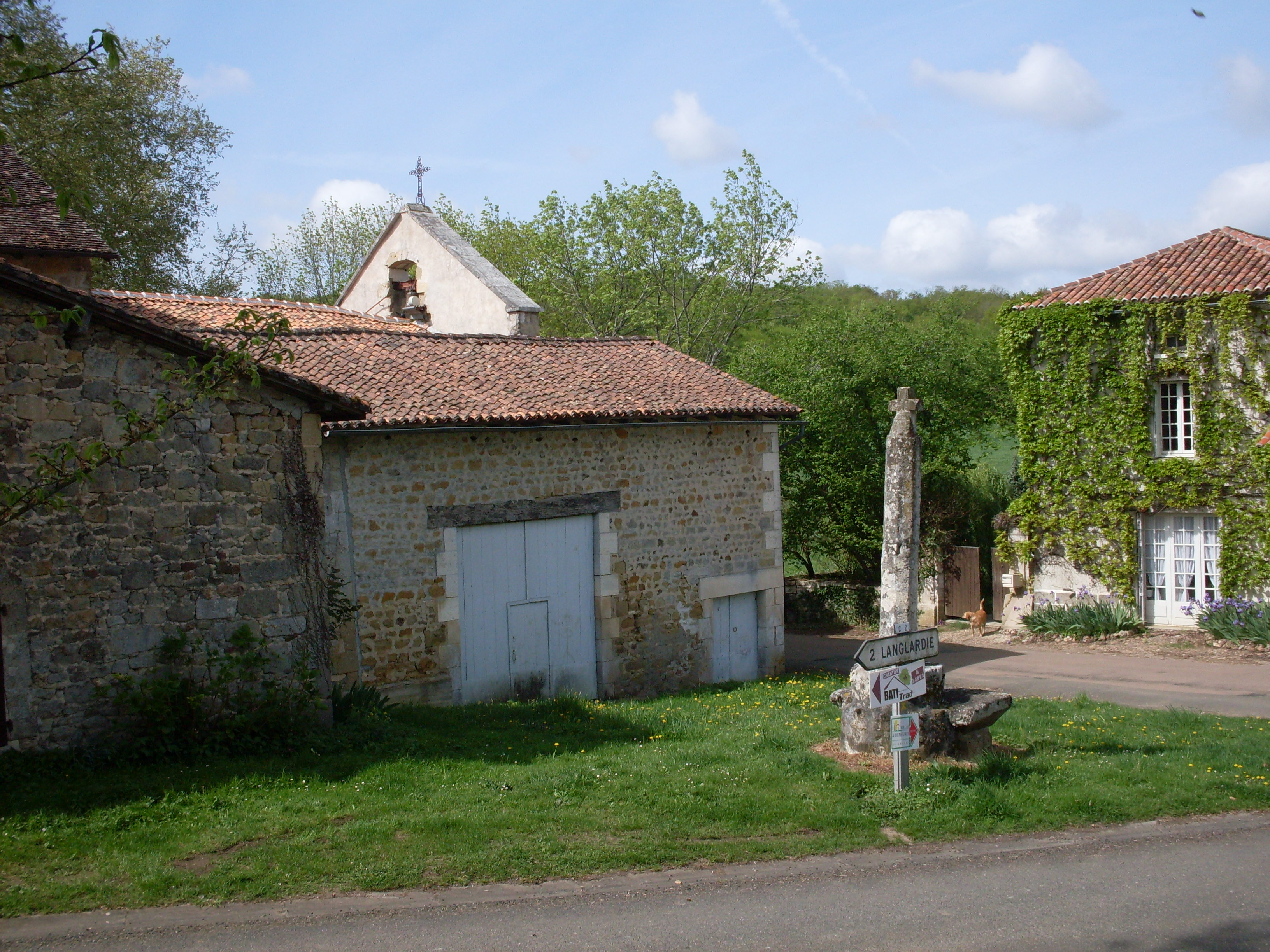 L'église de Soudat, Dordogne